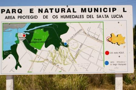 Plano de los humedales del Santa Lucía.